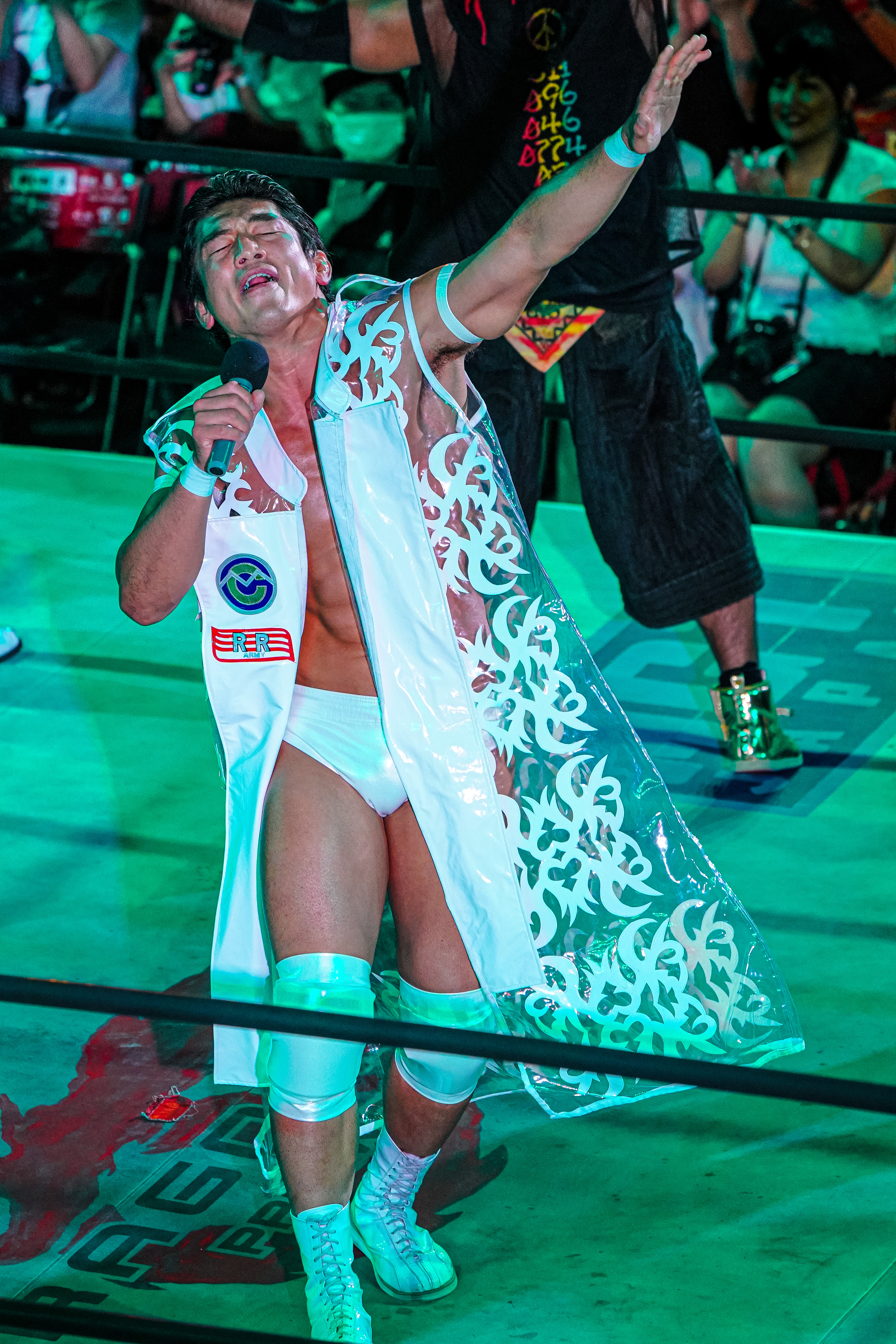 2019.07.04 後楽園ホール